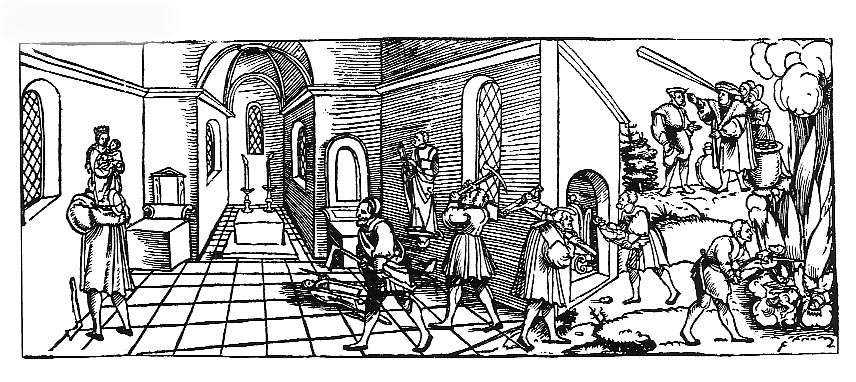 Erhard Schön, "Klagrede der armen verfolgten Götzen und Tempelbilder", Einblattholzschnitt, koloriert,um 1530, Schlossmuseum Gotha Inv. Nr. G 74,4.